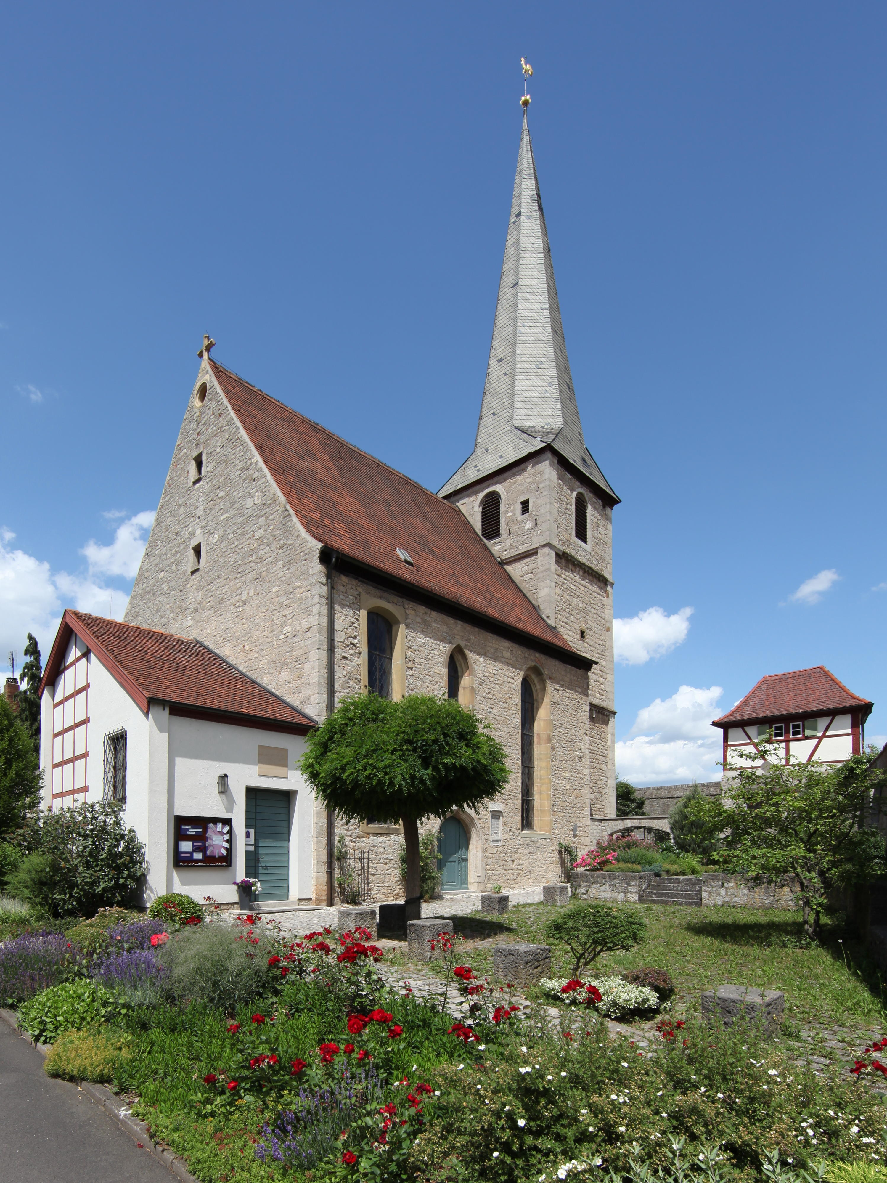 evangelische Kirche St. Martin in Segnitz, Bayern